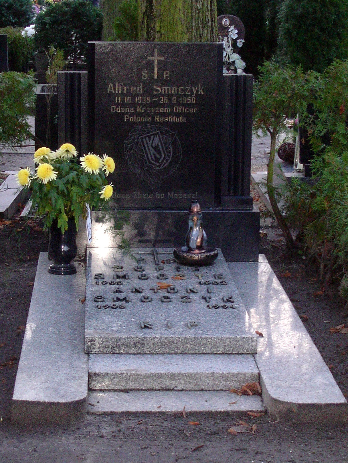 Nagrobek na grobie ALfreda Smoczyka